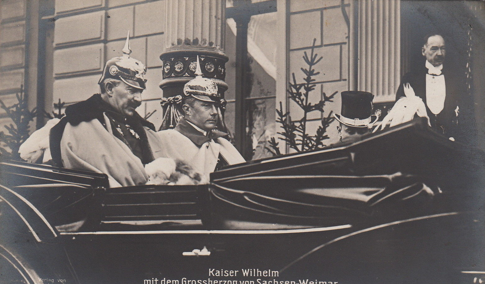 Kaiser Wilhelm II. und Großherzog Wilhelm Ernst von S-Weimar-Eisenach